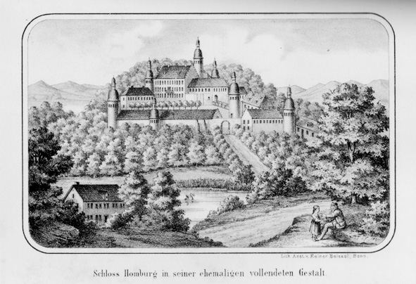 "Schloss Homburg in seiner ehemaligen Gestalt" (um 1750)